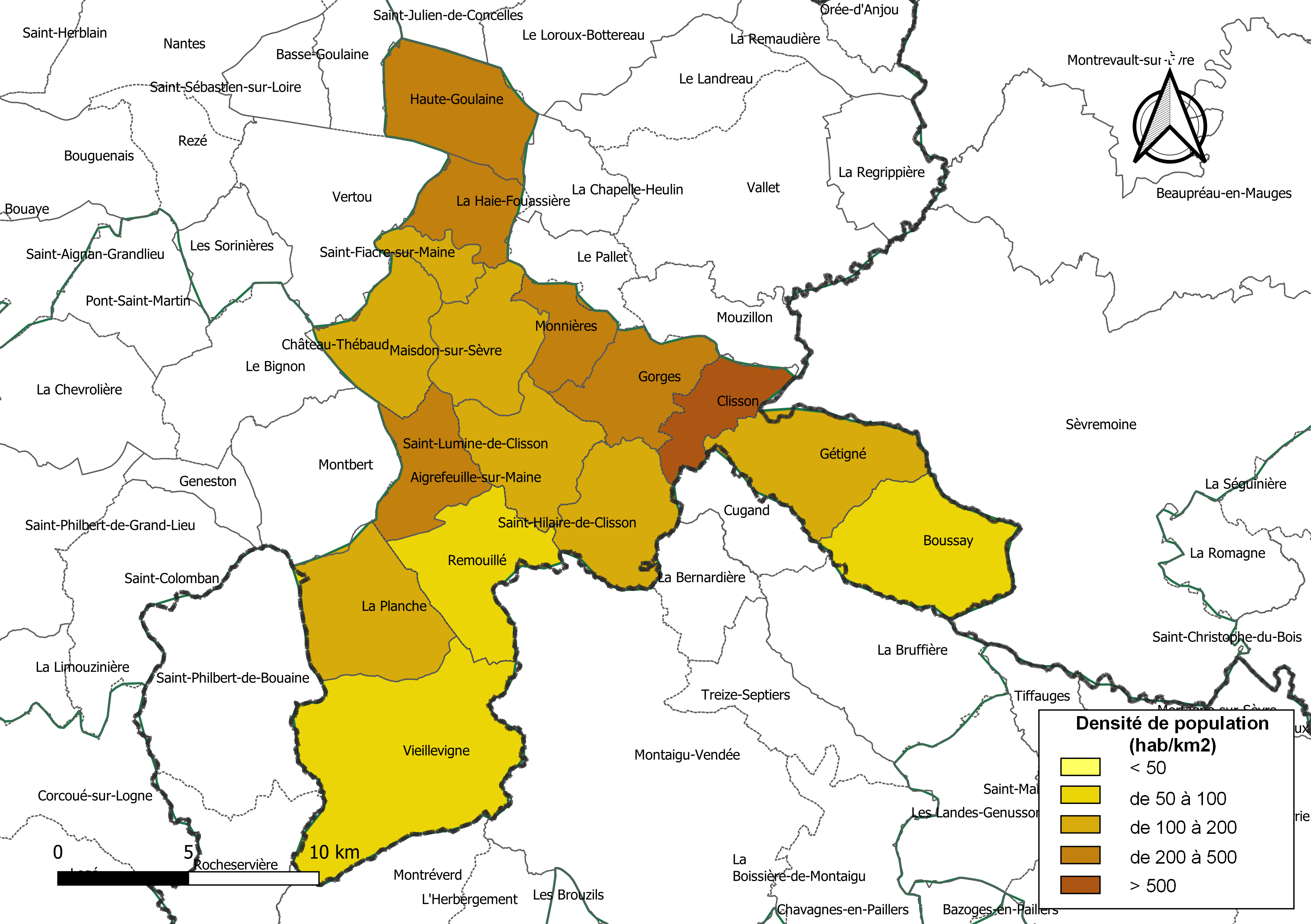 Carte des densités de population (millésimée 2016) des communes de l'intercommunalité Clisson Sèvre et Maine Agglo, département de la Loire-Atlantique, France. Composition au 1er janvier 2019.